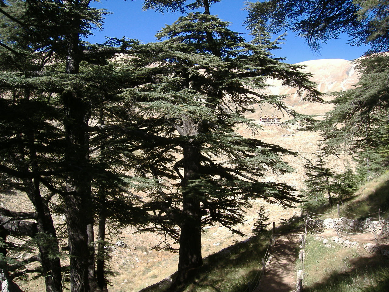 Cedrus libani var. libani, Lebanon.